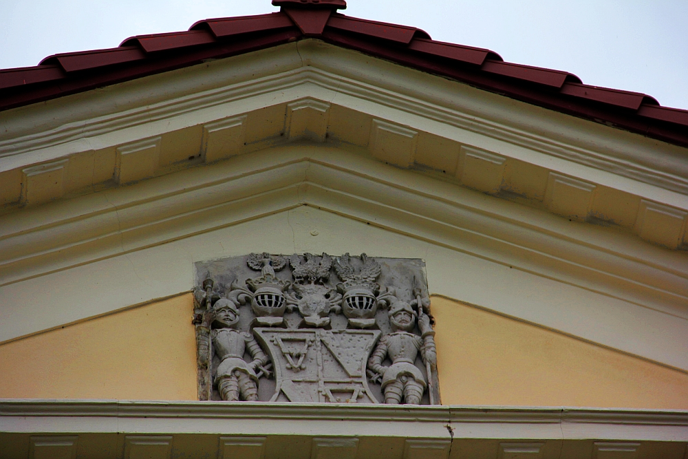 Pałac w Samotworze.